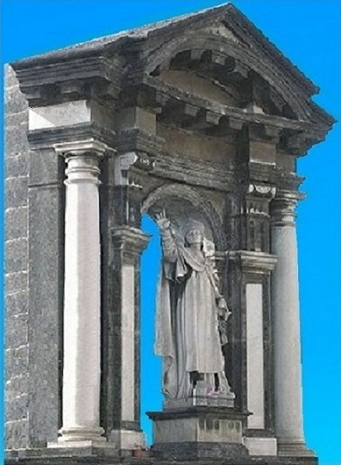 Naples - Statue de San Gennaro sur le pont de la Maddalena.